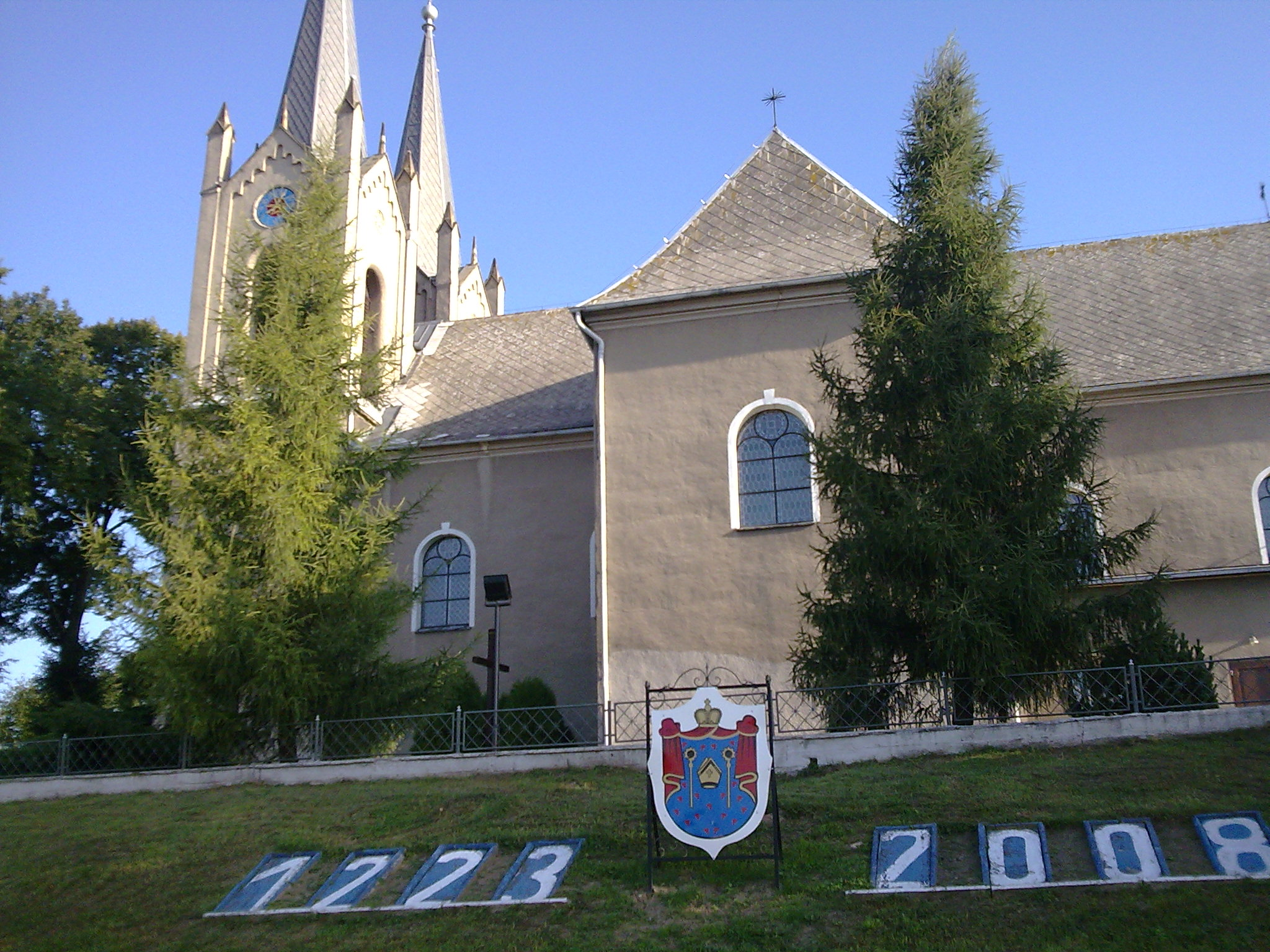 kosciół Sw.ndrzeja Apostoła przy ul.Strzeleckiej